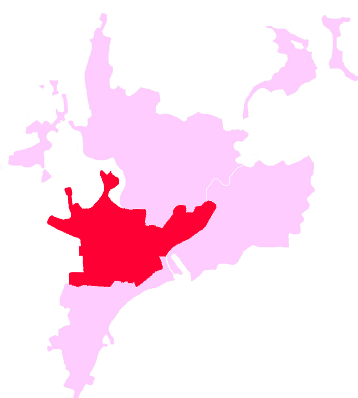 map